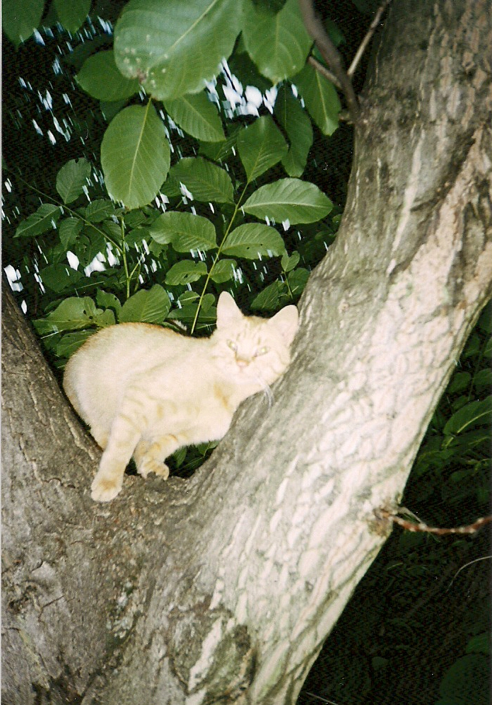 tohle je můj kocourek, jak si vylezl na strom